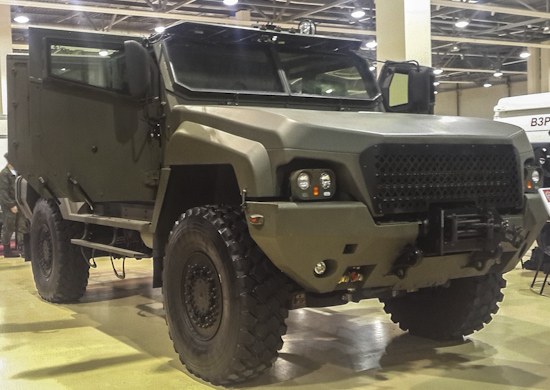 Бронеавтомобиль КАМАЗ-53949 «Тайфуненок»